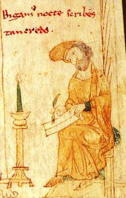 Der Vizekanzler Matheus von Salerno. Bigamus nocte scribens Tancredo